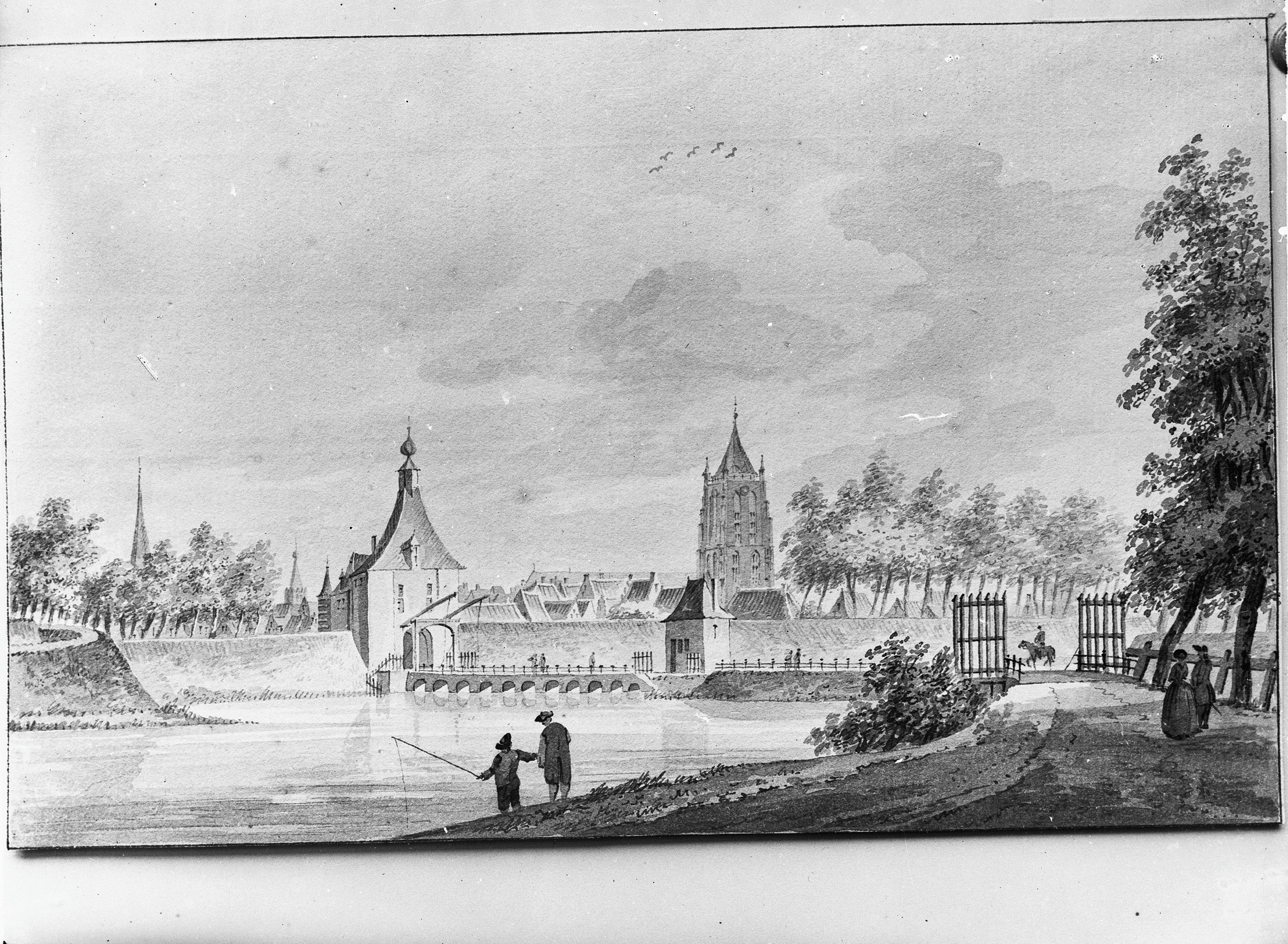 Plattegronden en Overzichten: stadsgezicht met Arkelpoort en Grote Kerk, tekening